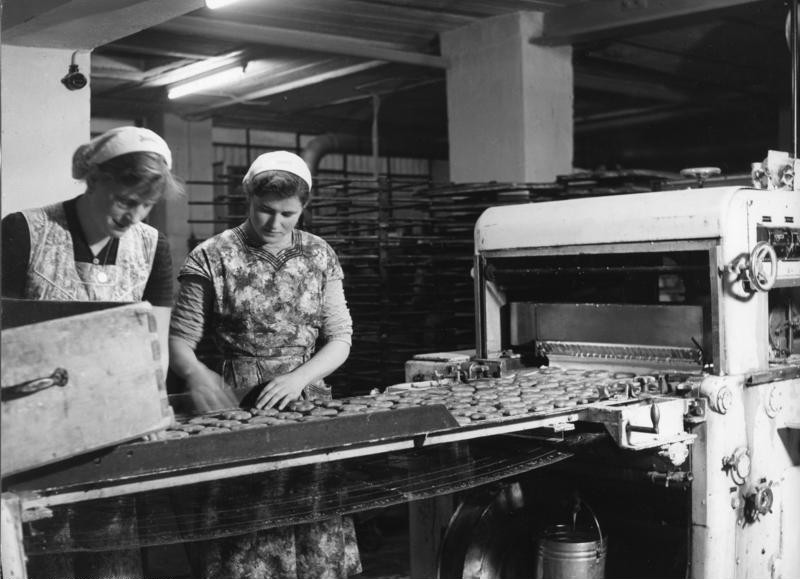 Ferdinand Wolff, Nürnberger Lebkuchenfabrik Nürnberger Lebkuchengebäck wird mit einer Zuckerglasur in der Glasurmaschine versehen. Das Bild zeigt den Auflagetisch.